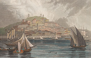 Vista di Cagliari